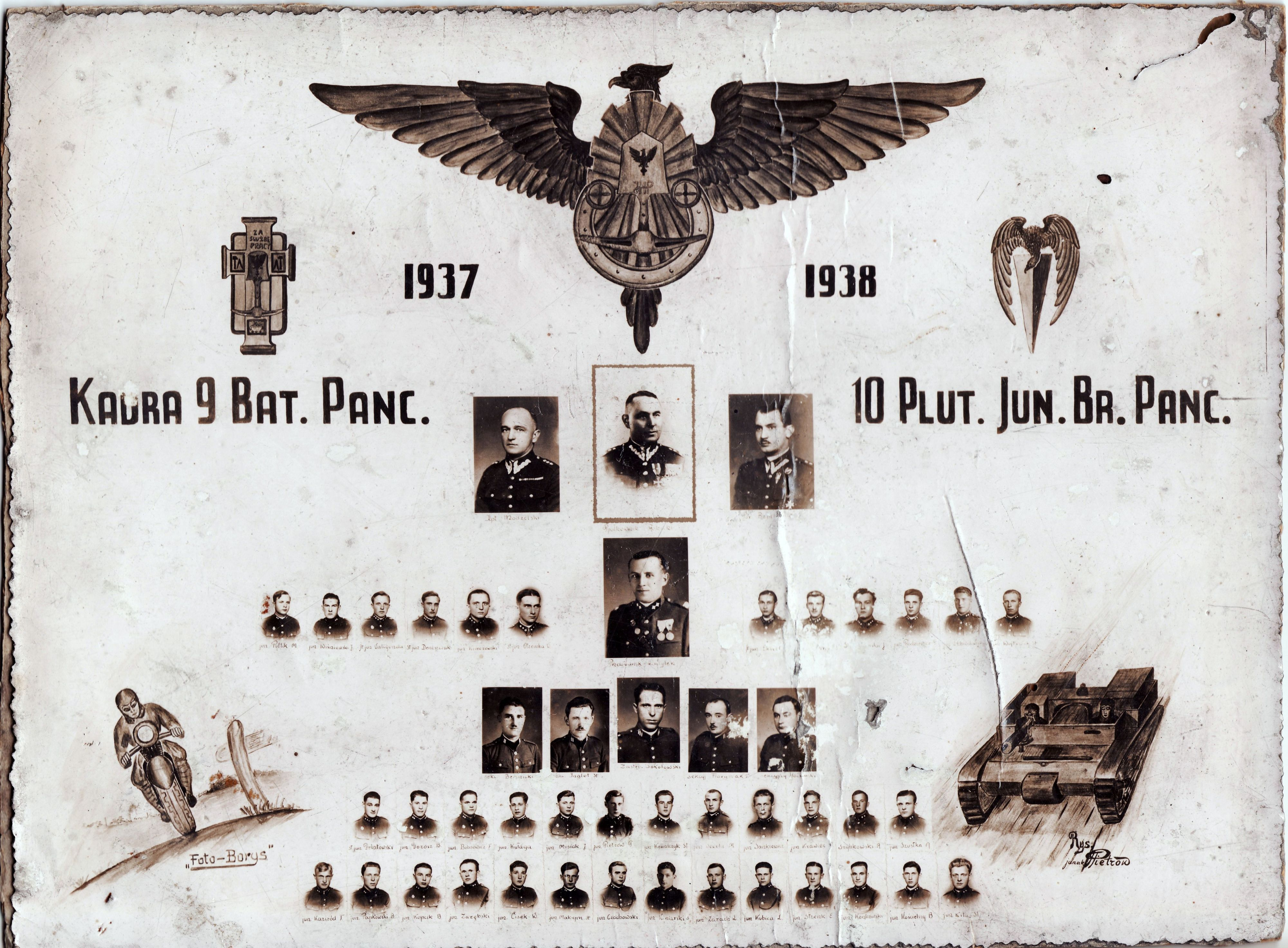 Żołnierze Kadry 9 batalionu pancernego 10 plutonu